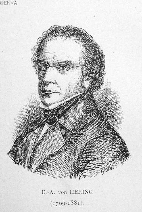 E.-A. von Hering (1799-1881), vétérinaire, dessiné par Louis Georges Neumann